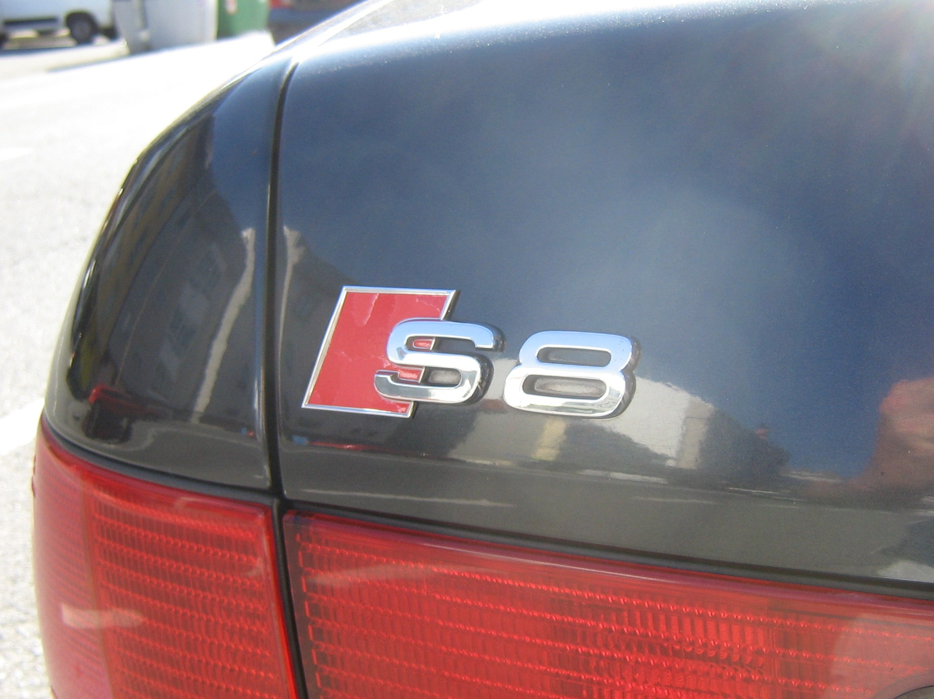 Logotipo de un Audi S8 D2 en la parte trasera.